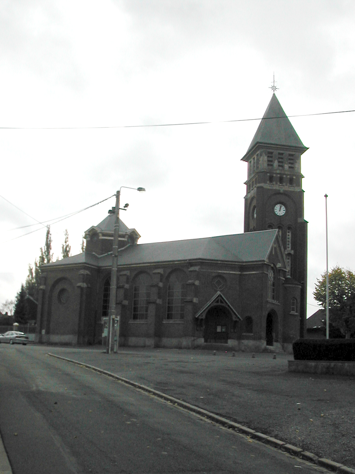 L'église.